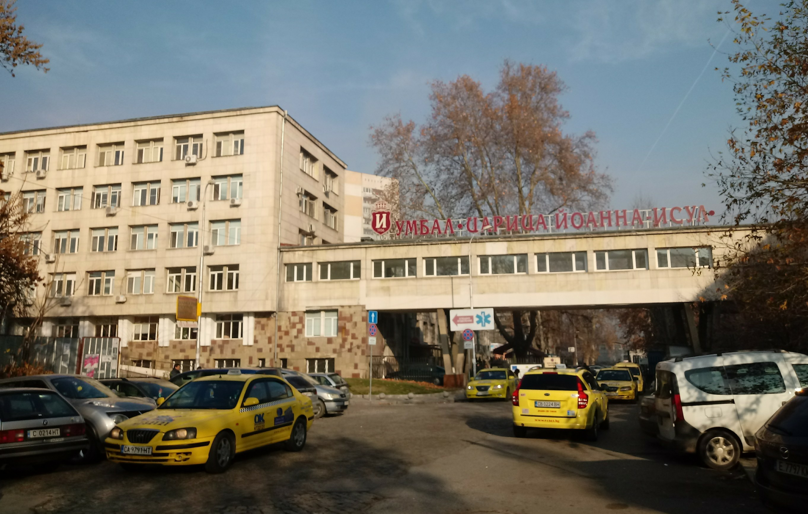 УМБАЛ Царица Йоанна - ИСУЛ - София